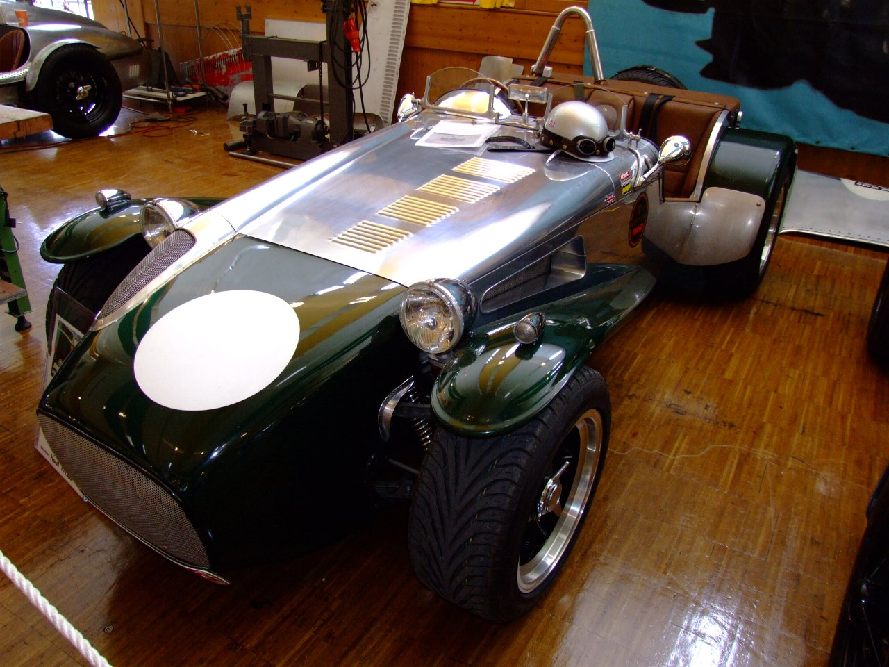 Dutton S1 1600 ccm 100 PS 1975